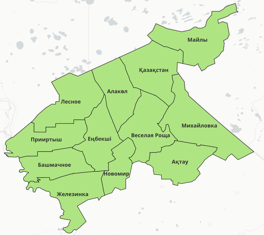 Бланкова карта Железинського району (АТП району)